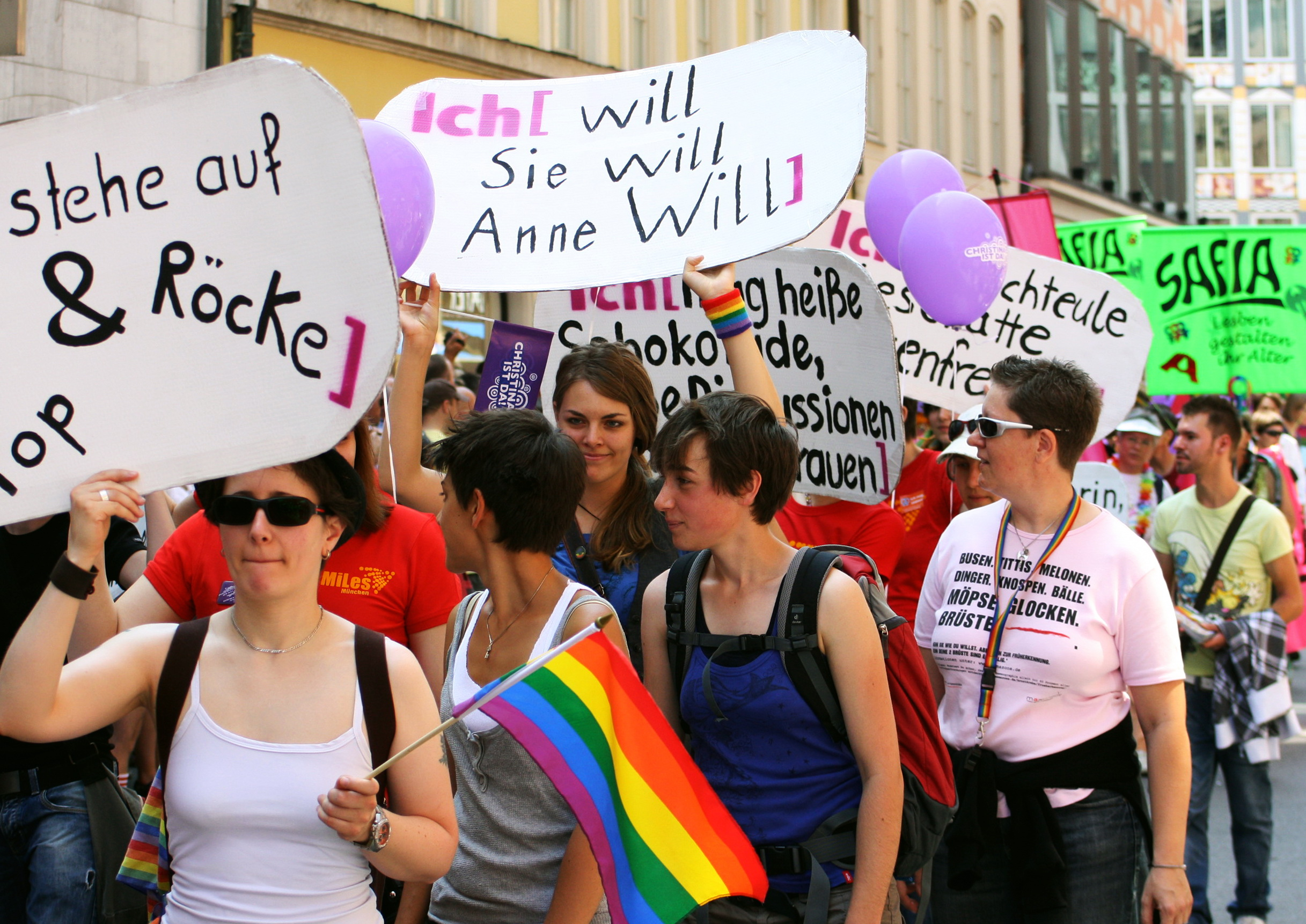 CSD in München 2011